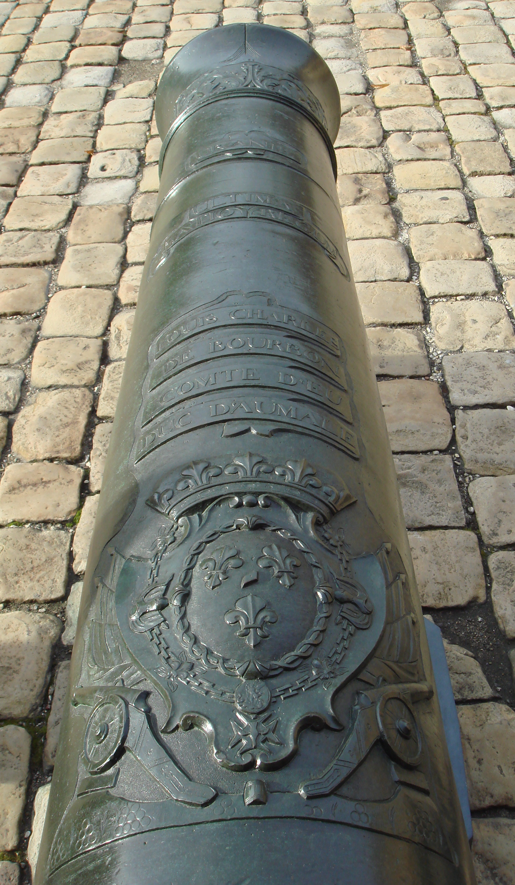 De_Valliere_gun_front